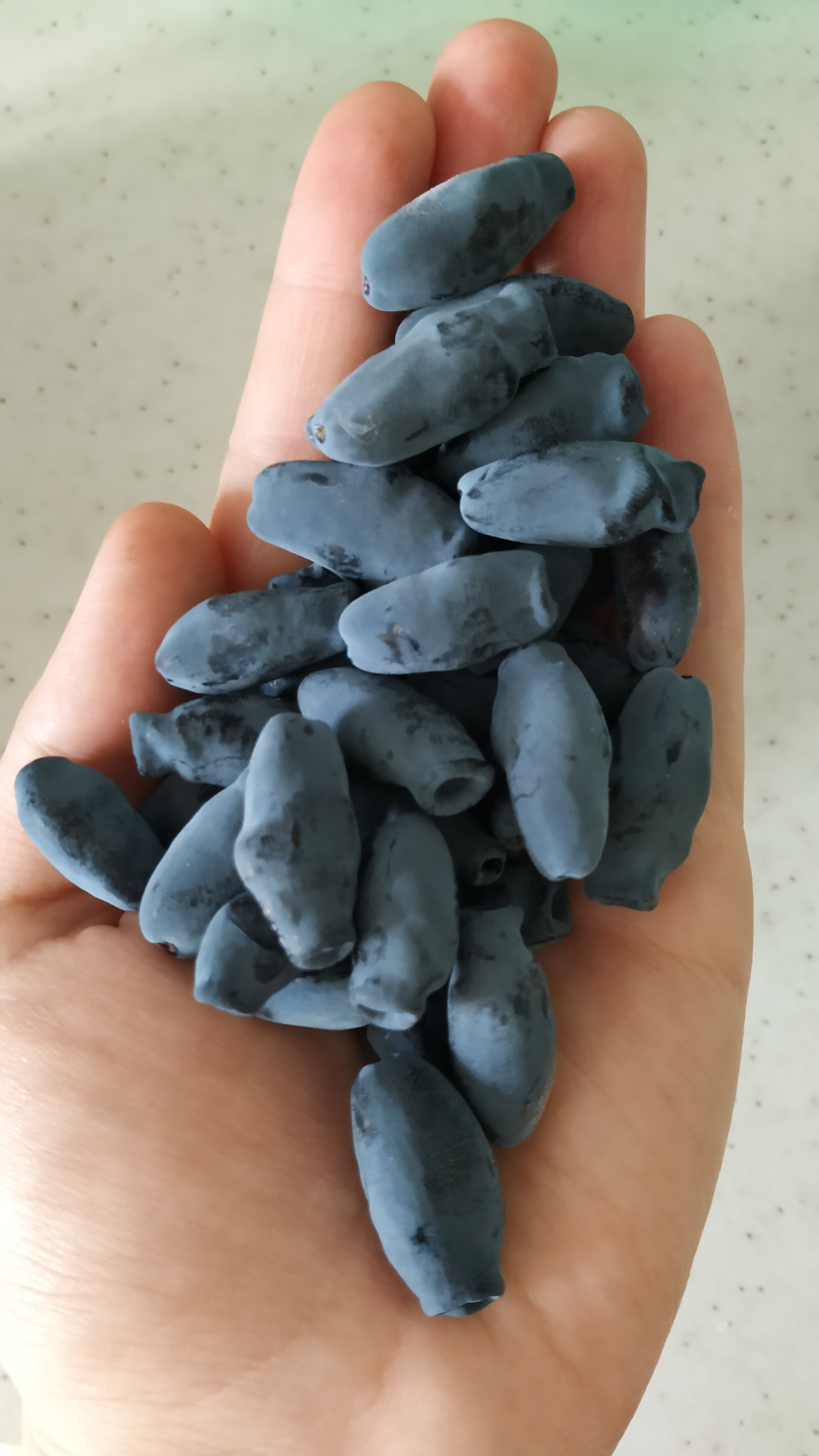 Сорт 'Синяя Птица' получен от свободного опыления дикорастущей формы жимолости камчатской (Lonicera caerulea var. kamtschatica). Авторы: Жолобова З.П., Калинина И.П., Лучник З.И. Выведен в НИИ садоводства Сибири им. М.А.Лисавенко В Государственном реестре селекционных достижений с 1989 года. Сорт характеризуется ранним сроком созревания и слабой осыпаемостью ягод. Вес ягод в среднем составляет 0,8 г, средняя урожайность - 1-2 кг с куста. Дегустационная оценка - 4,5 балла.